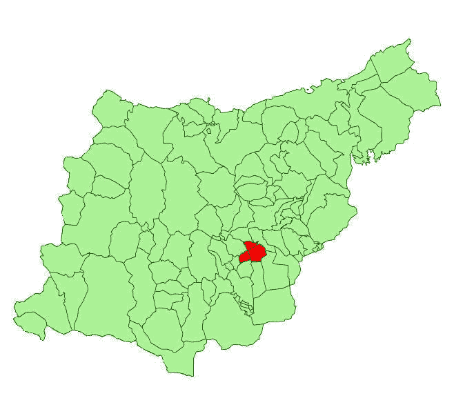 Summary == es: Mapa localizador del municipio de Orendain en la provincia de Guipúzcoa en: Orendain municipality in the province of Guipuzcoa eu: Orendaingo udal eremuak Gipuzkoa barruan es: Mapa localizador del municipio de Baliarrain en la provincia de Guipúzcoa en: Baliarrain municipality in the province of Guipuzcoa eu: Baliarraingo udal eremuak Gipuzkoa barruan es: Mapa localizador del municipio de Icazteguieta en la provincia de Guipúzcoa en: Ikaztegieta municipality in the province of Guipuzcoa eu: Ikaztegietako udal eremuak Gipuzkoa barruan == Licensing